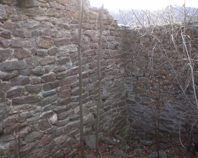 Zelen grad